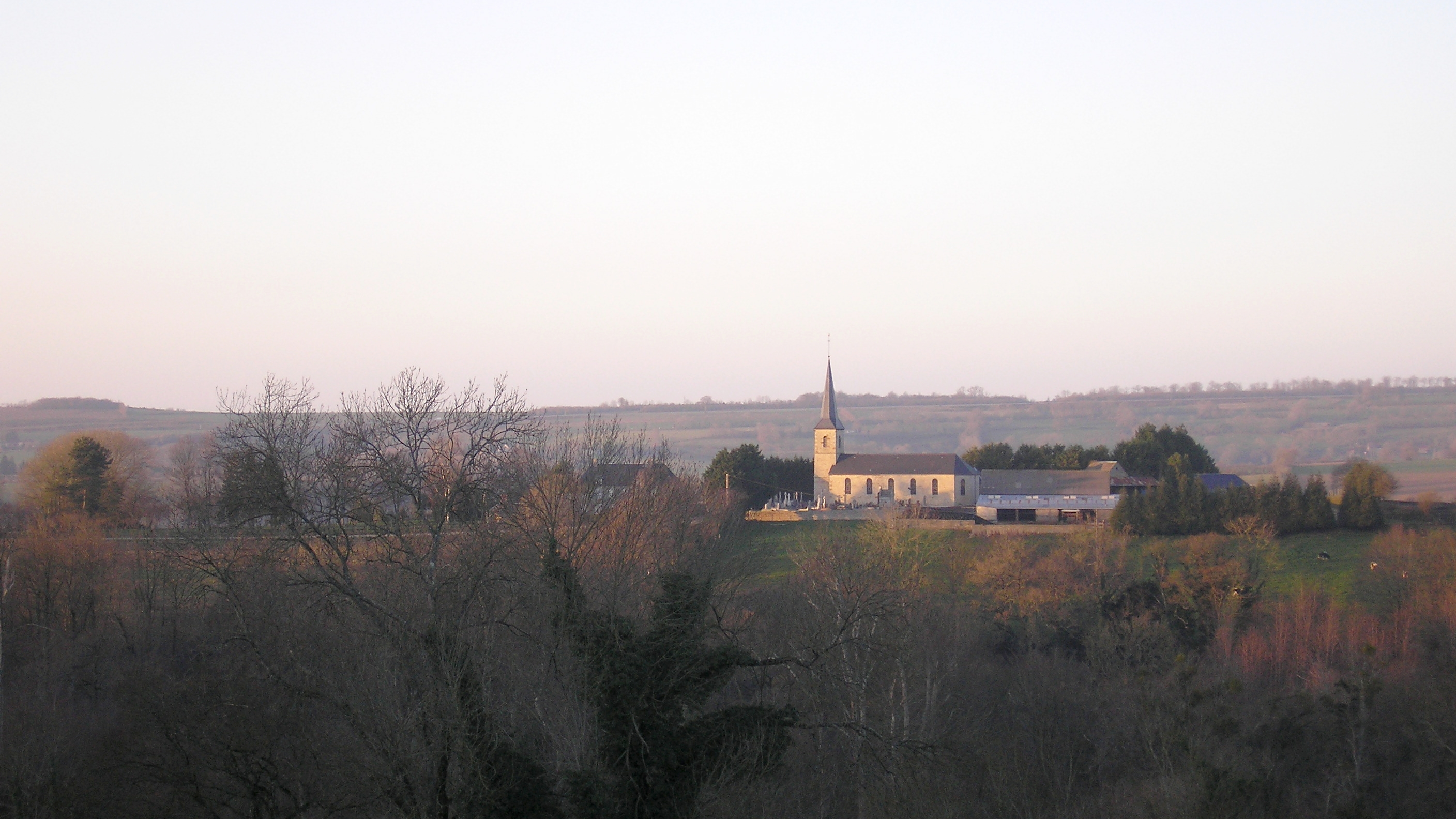 Pont-Bellanger (Normandie, France). Vue méridionale du bourg.